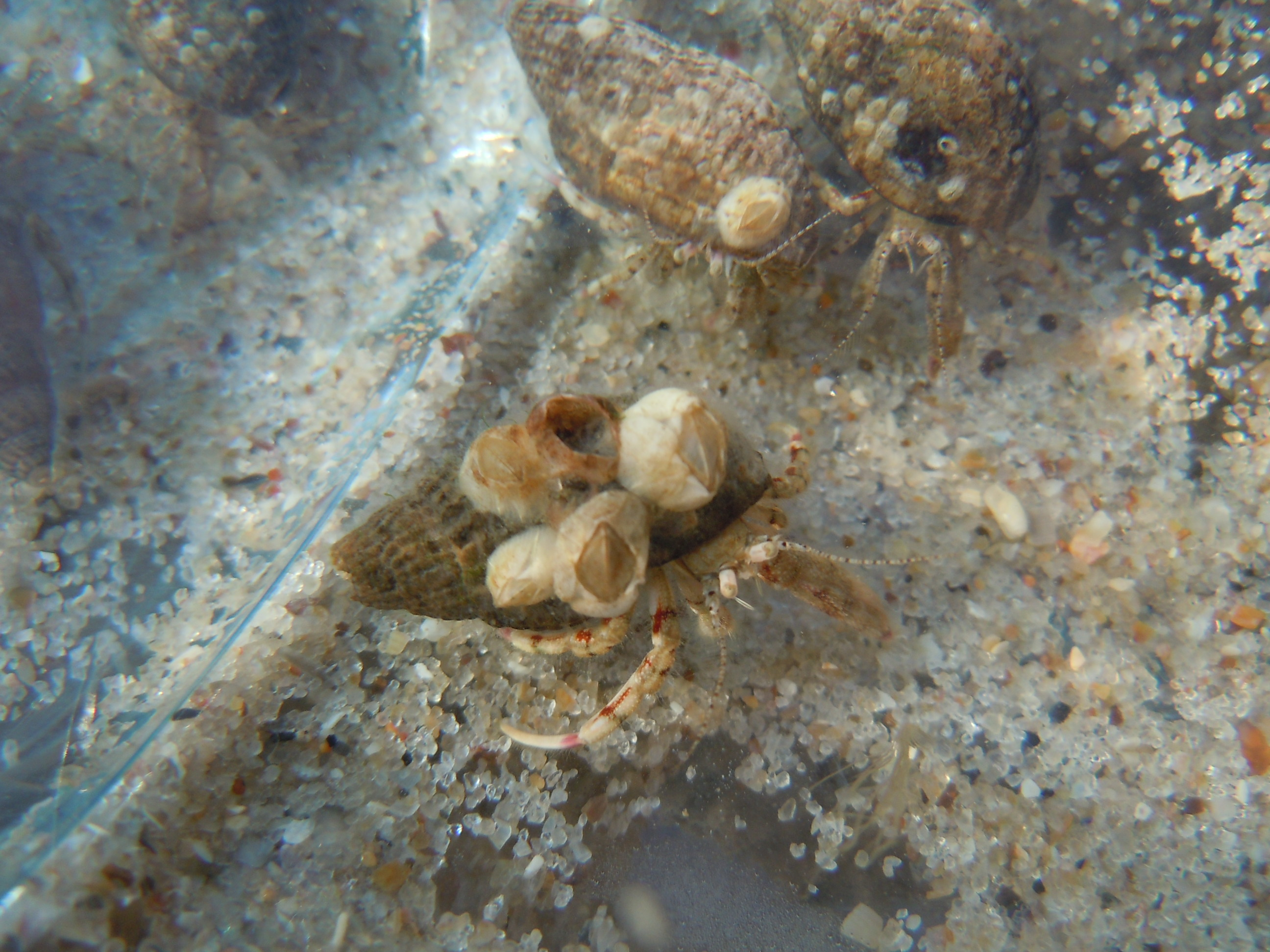 Рак-діоген самітник (Diogenes pugilator) з Чорного моря, Сергіївка